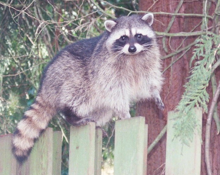 Procyon lotor malantaŭ la domo de la fotinto.